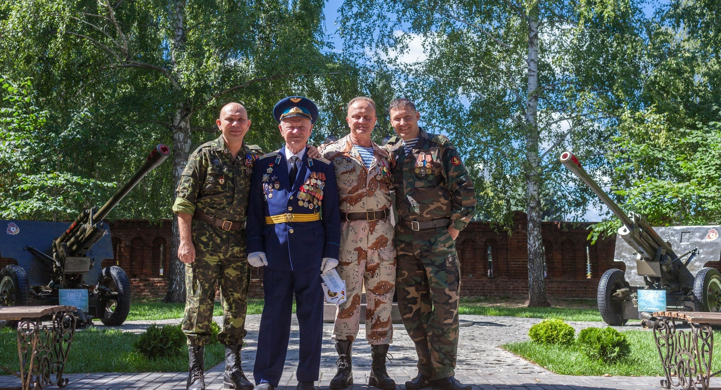 Инициативная группа по созданию памятного знака коломенским курсантам справа налево Авторы проекта: Лик Д.С., Редько А.А., Инициативная группа : Редько А.В., Карачевцев К.В.